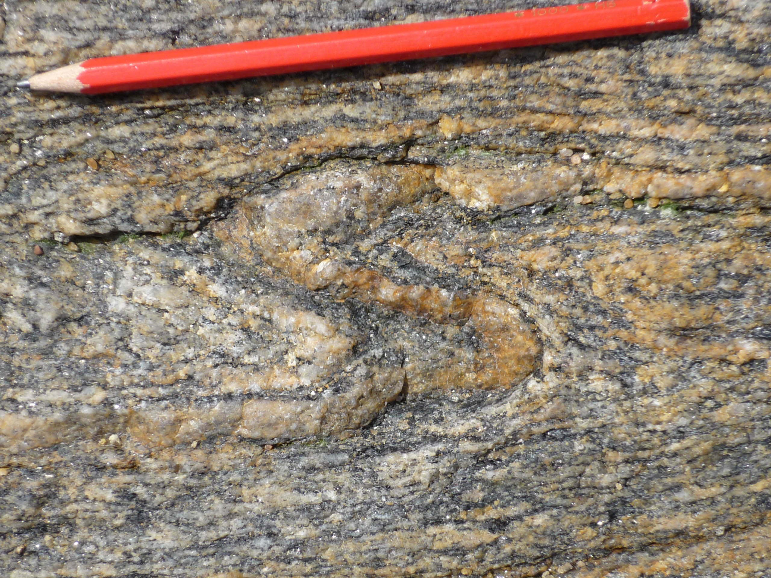 La Chaume, Sables d'Olonne, France:un petit pli en "s" dans le gneiss